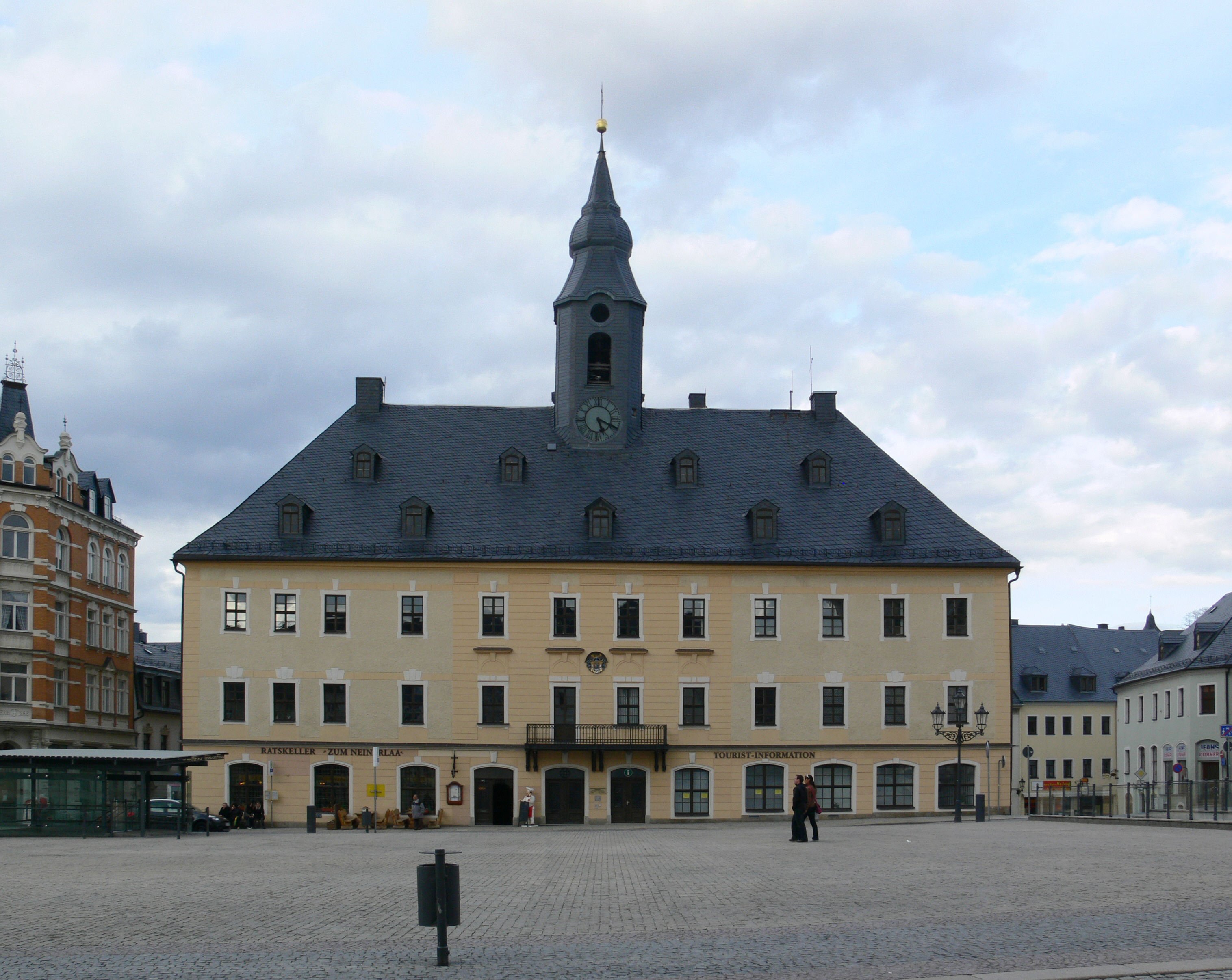 Annaberg-Buchholz, Rathaus am Markt